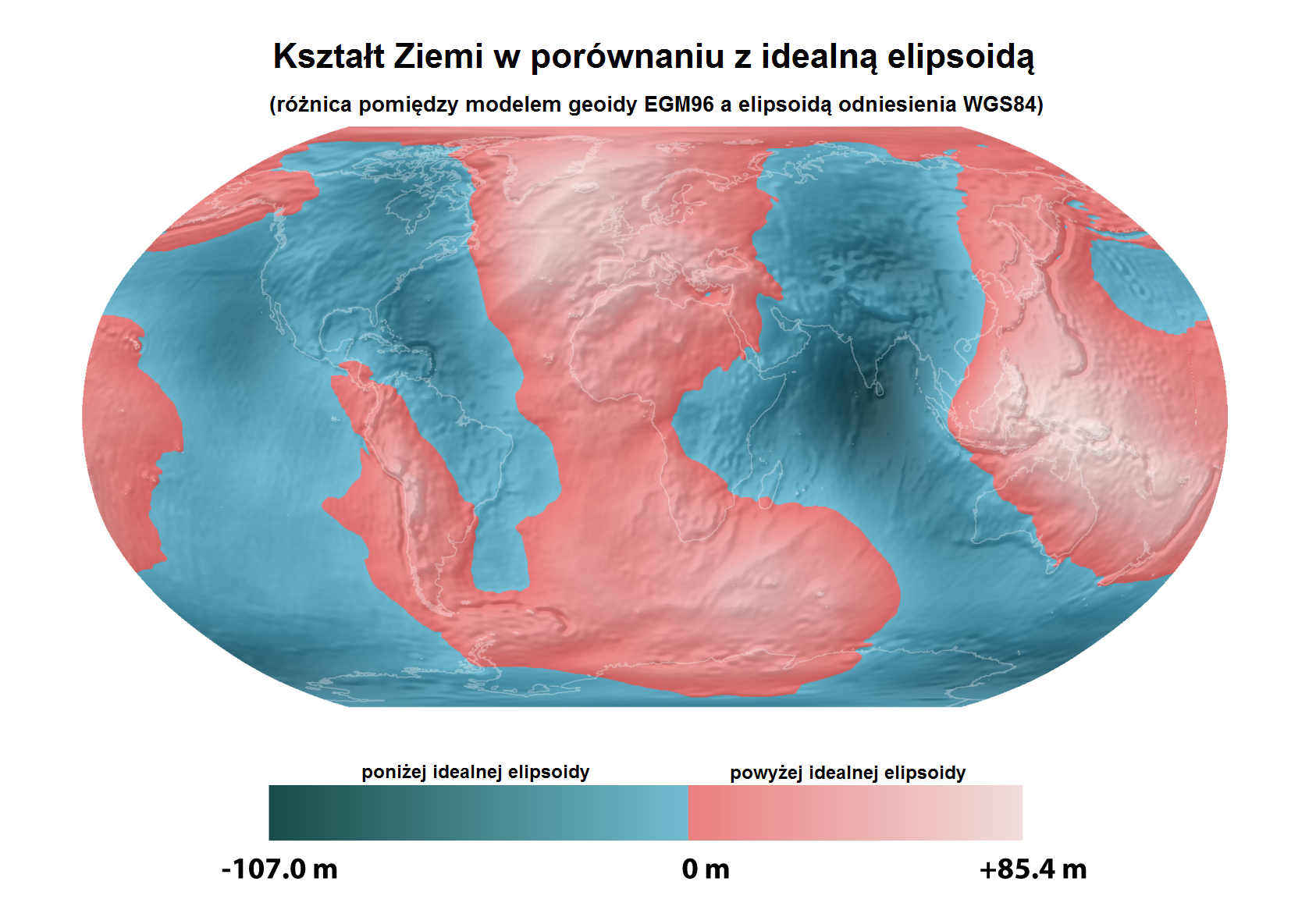 Odchylenie geoidy od idealnej elipsoidy